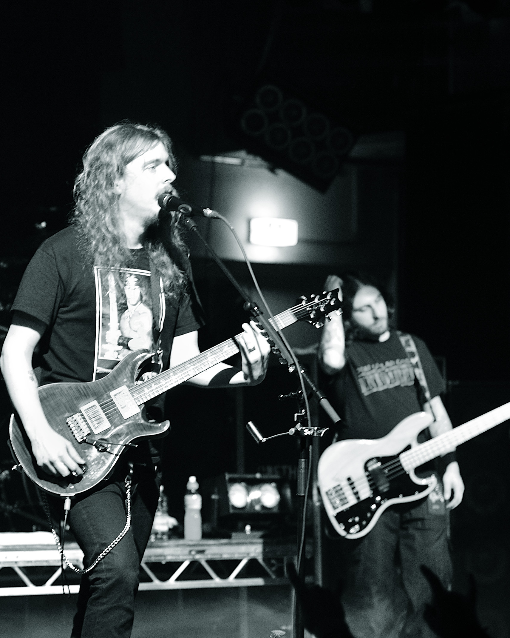 Opeth, Munich Backstage Werk, Saturday 6 December 2008 Mikael Åkerfeldt, Martin Mendez